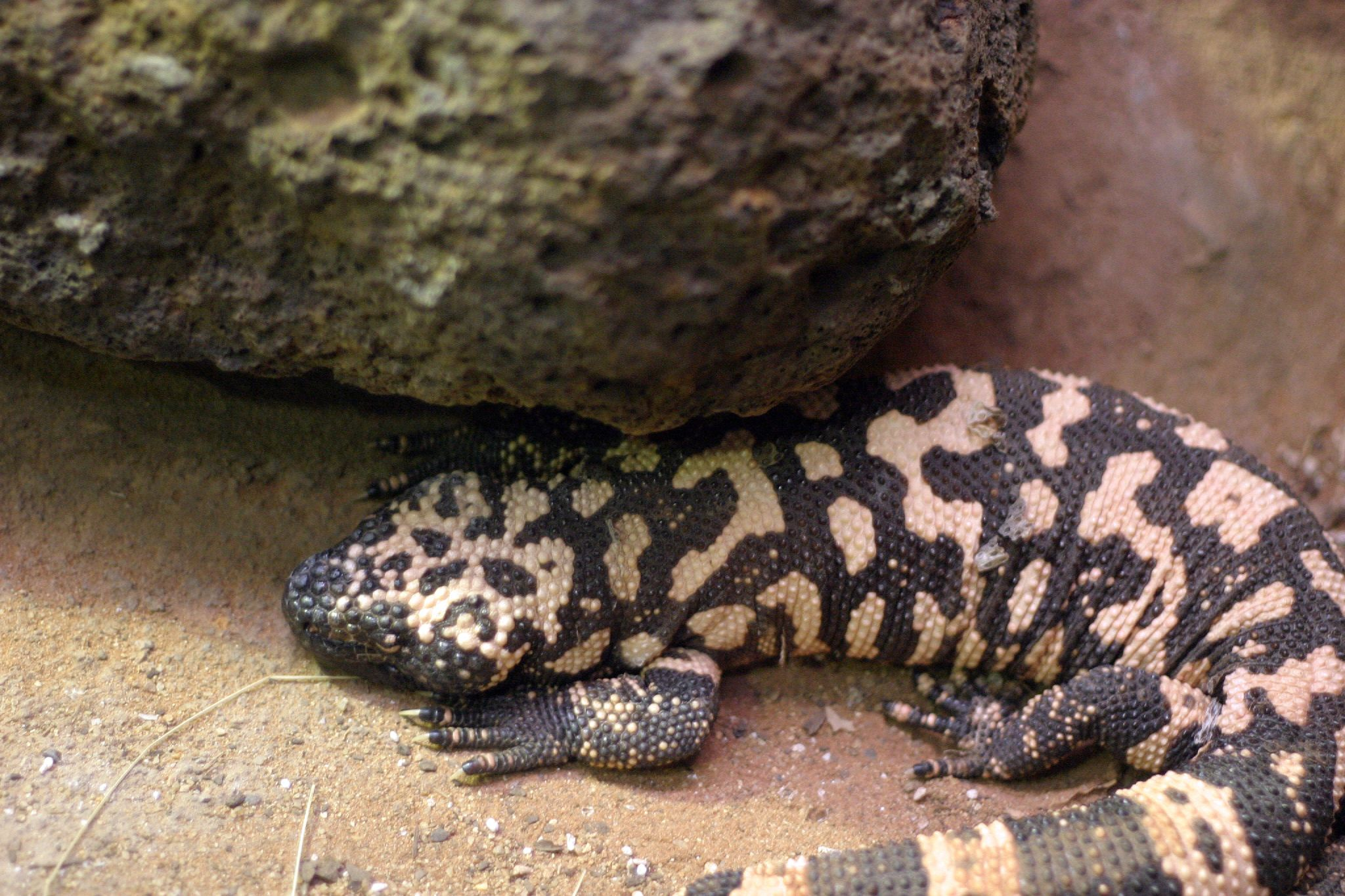 Gila Monster (Heloderma suspectum)